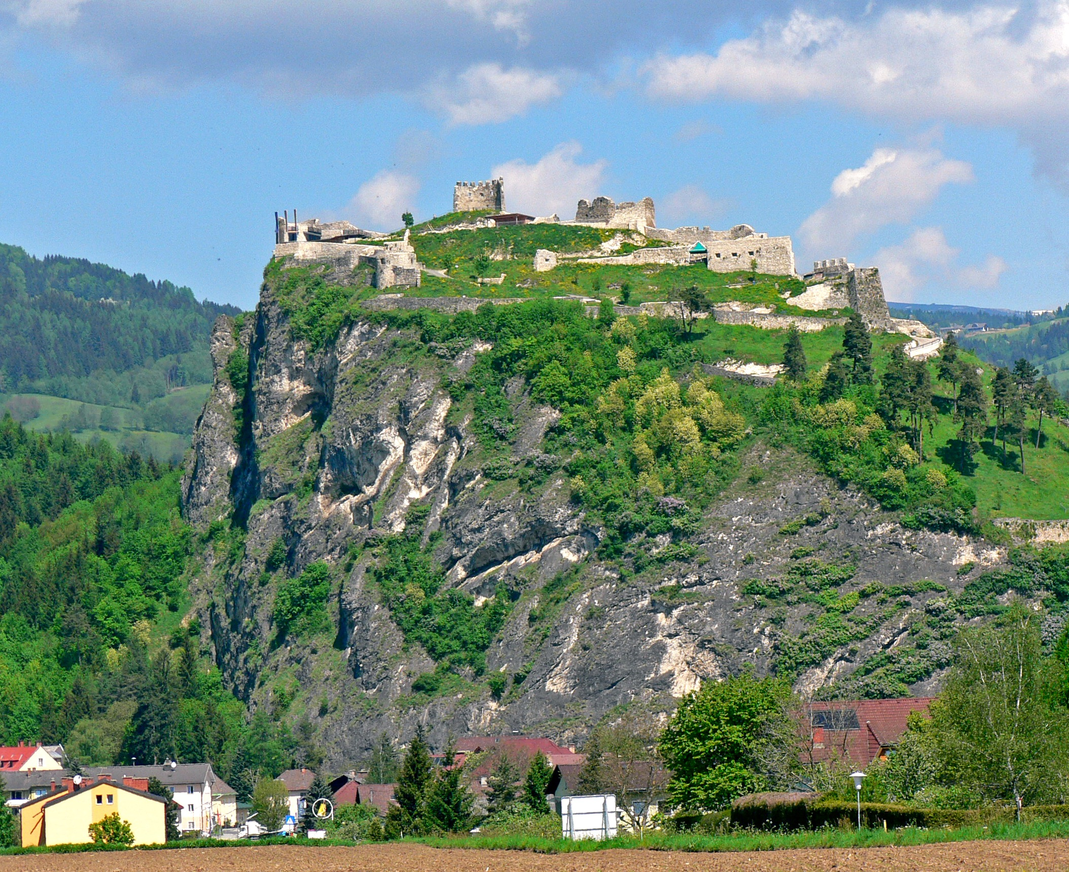 Festung Griffen in Kärten / Österreich. Aufnahme von Mai 2007